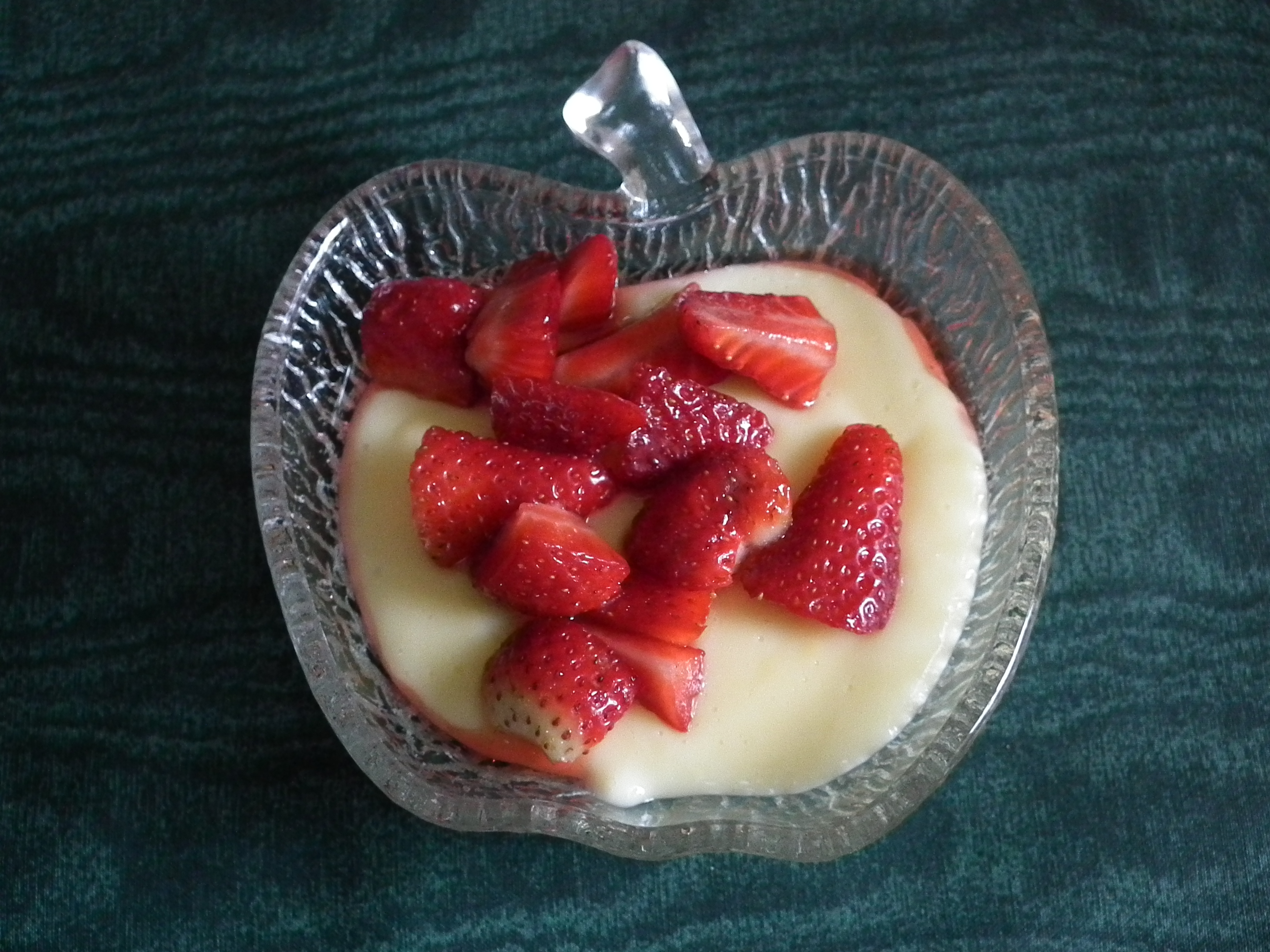 Vanillepudding mit frischen Erdbeeren